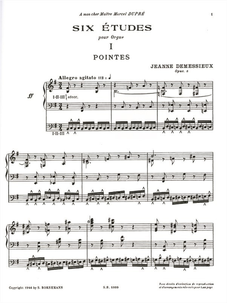 Primera página de Six Études de Jeanne Demessieux.